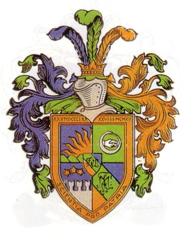 Studentenwappen der Fraternitas Lettica